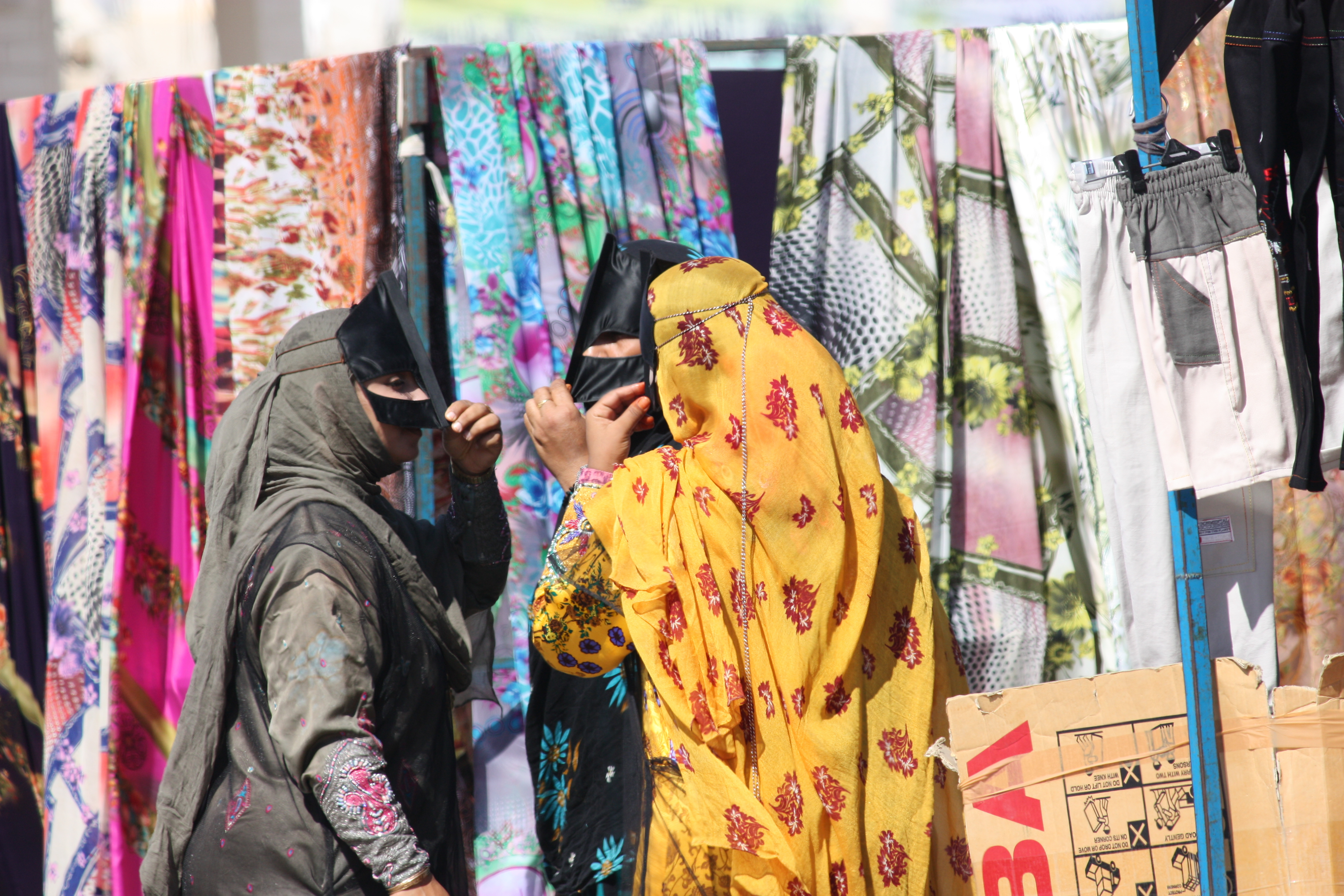 Sinaw, Bedouin women